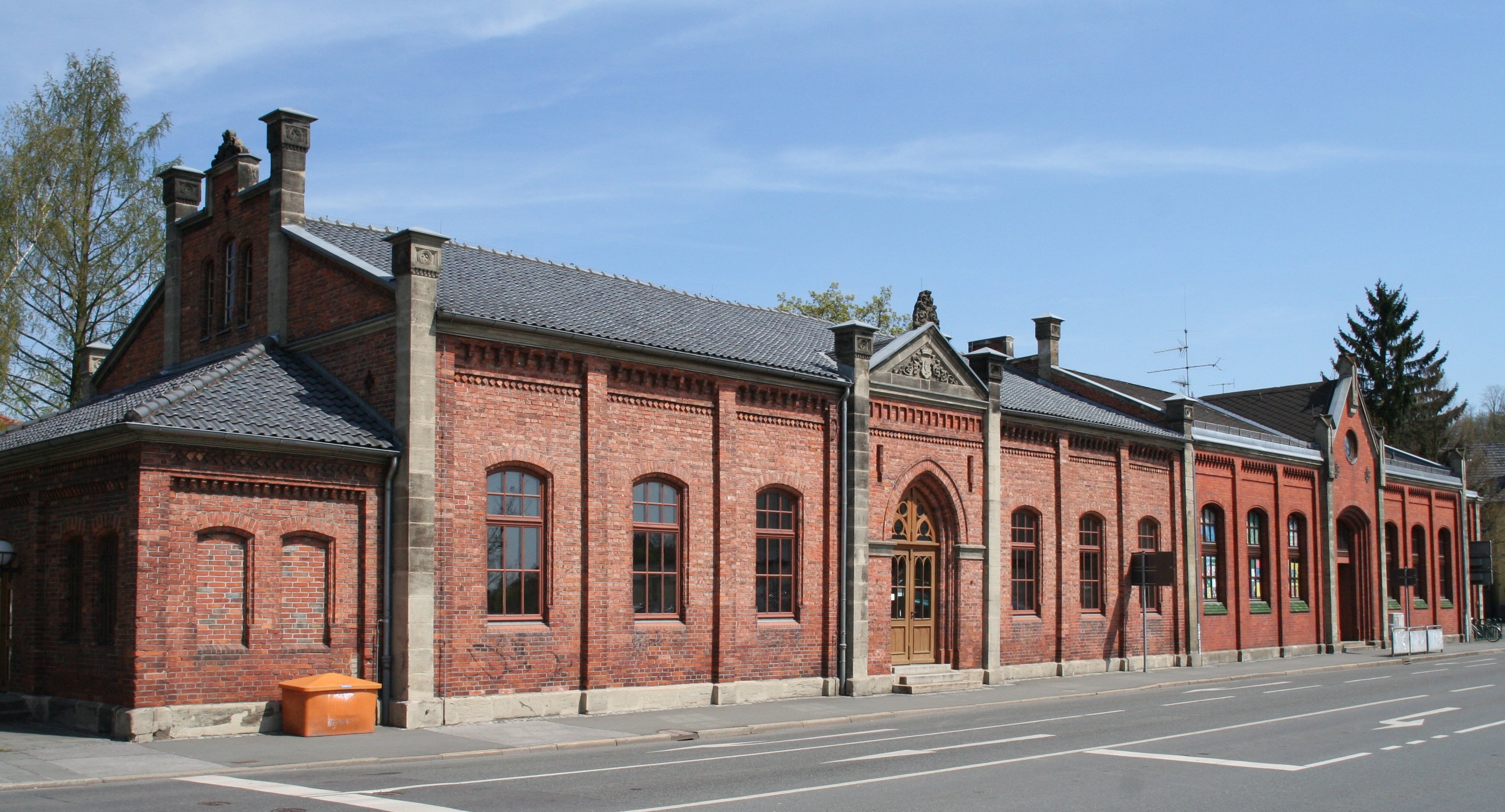 Coburg, Schützenstraße 1a/2 (Angerturnhallen)